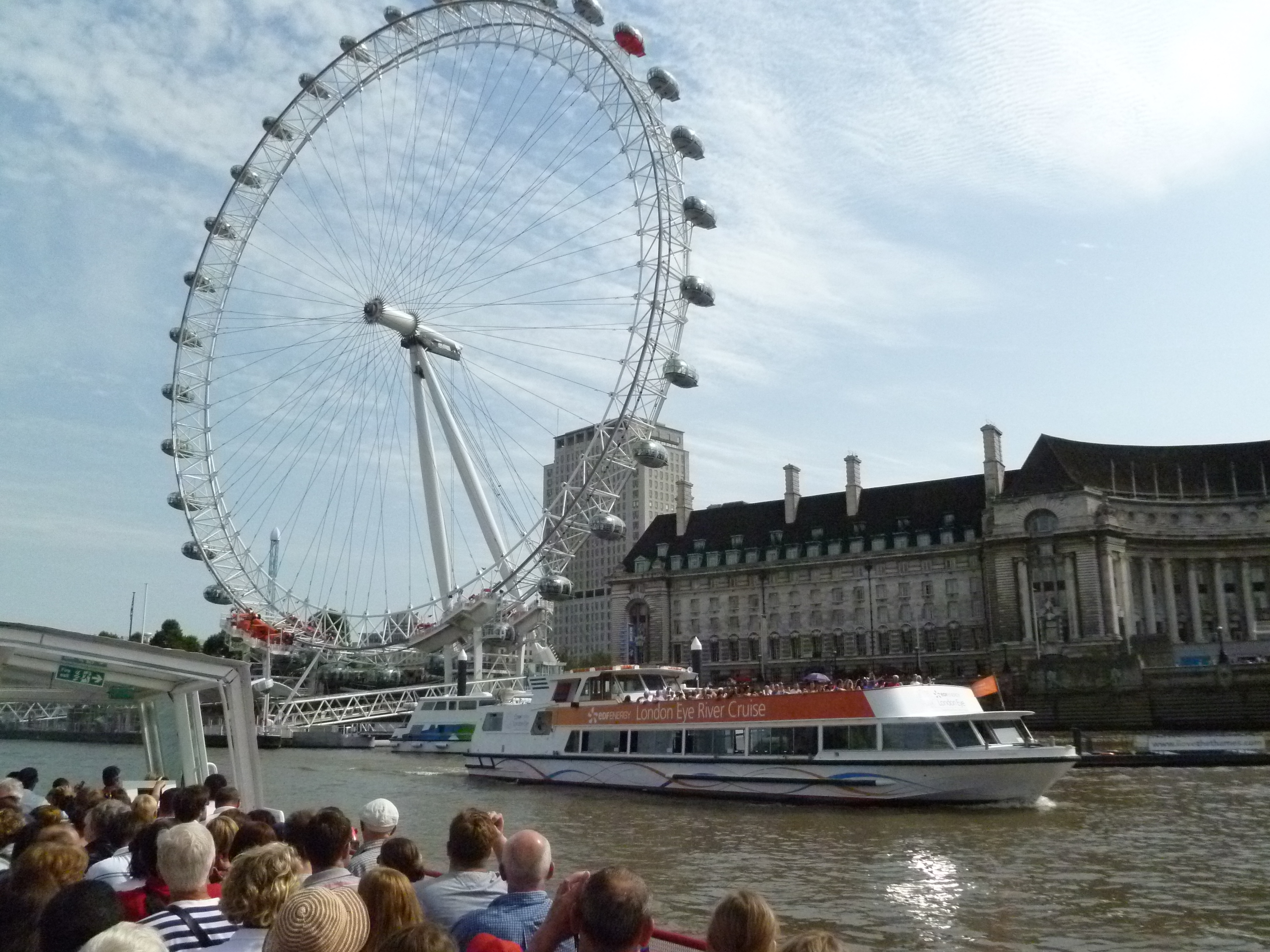 Экскурсионный тур по реке Темзе (Лондон, Великобритания). Вид на знаменитое колесо обозрения "Лондонский глаз" (London Eye).